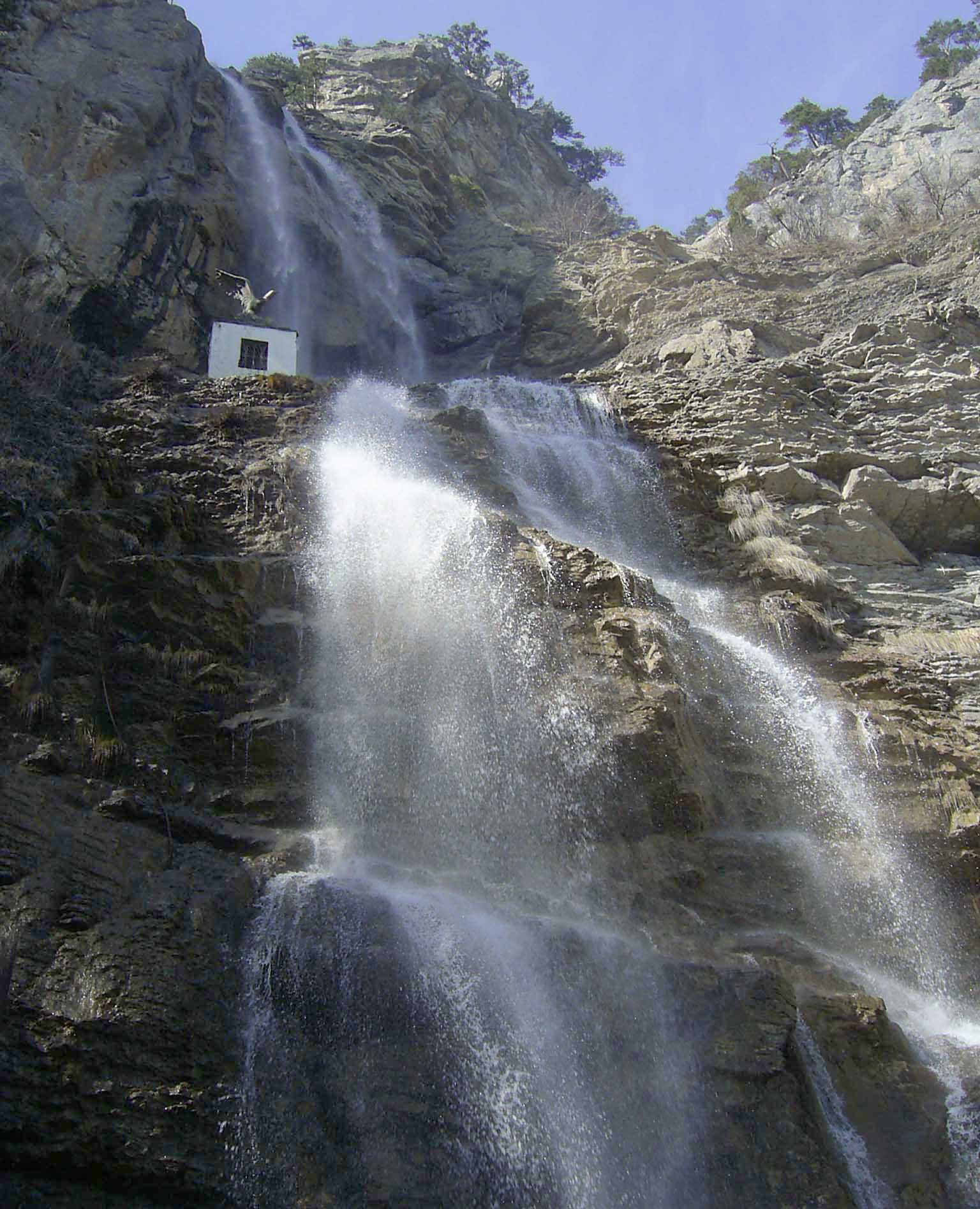 Водоспад Учан-Су